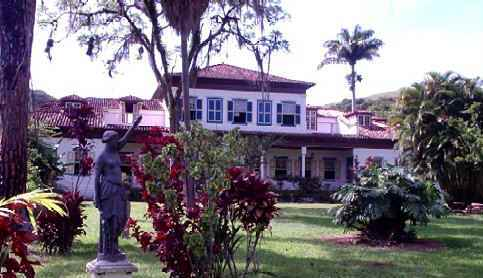 Historic Fazenda, Paraiba Valley, Brazil